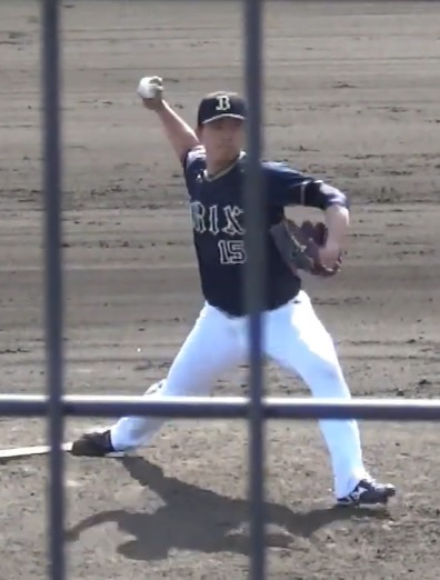 荒西祐大投手 対阪神二軍戦（2019/4/11、鳴尾浜球場）